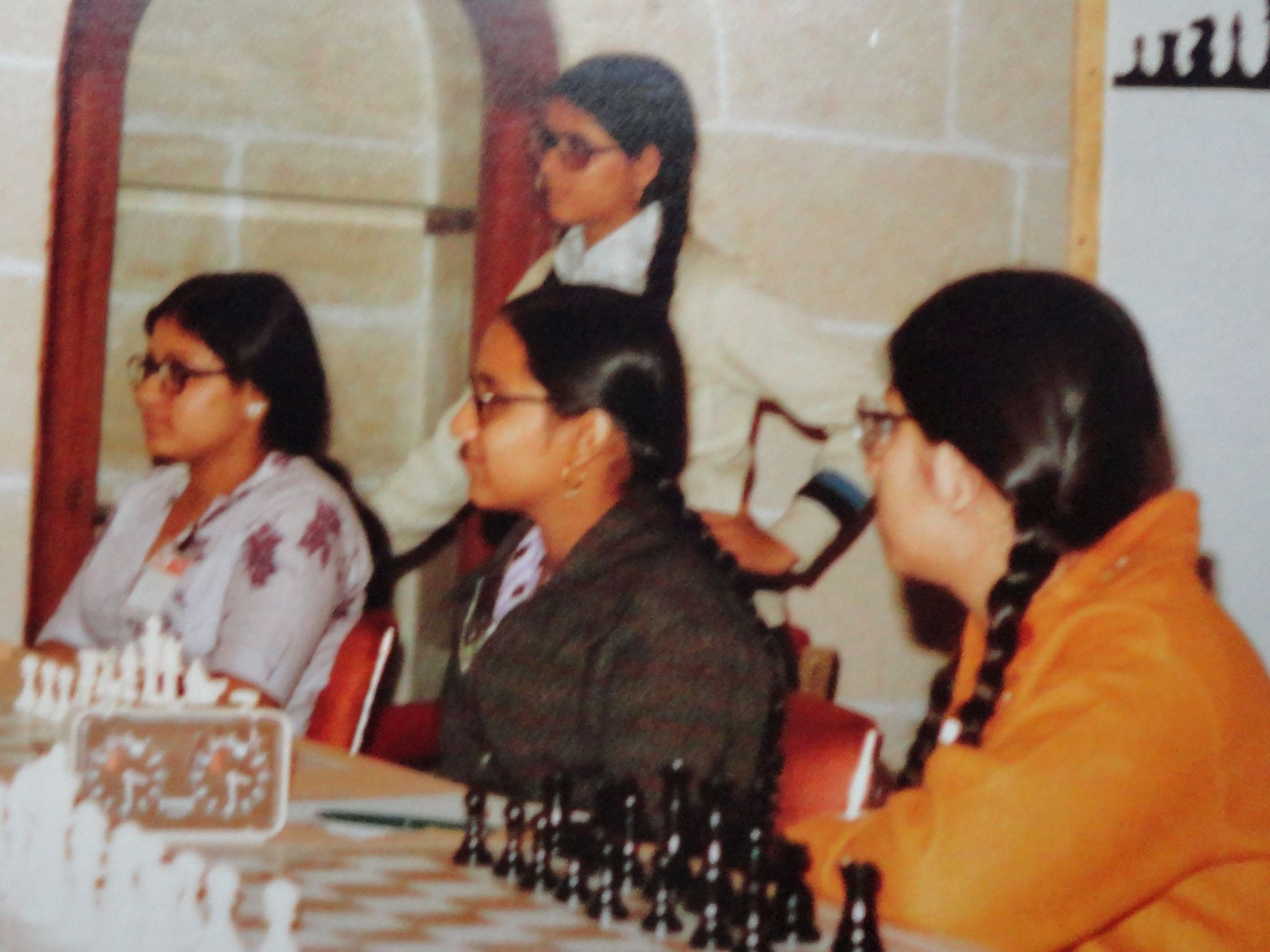 Die Schwestern Khadilkar, Schacholympiade 1980 in Valletta auf Malta.